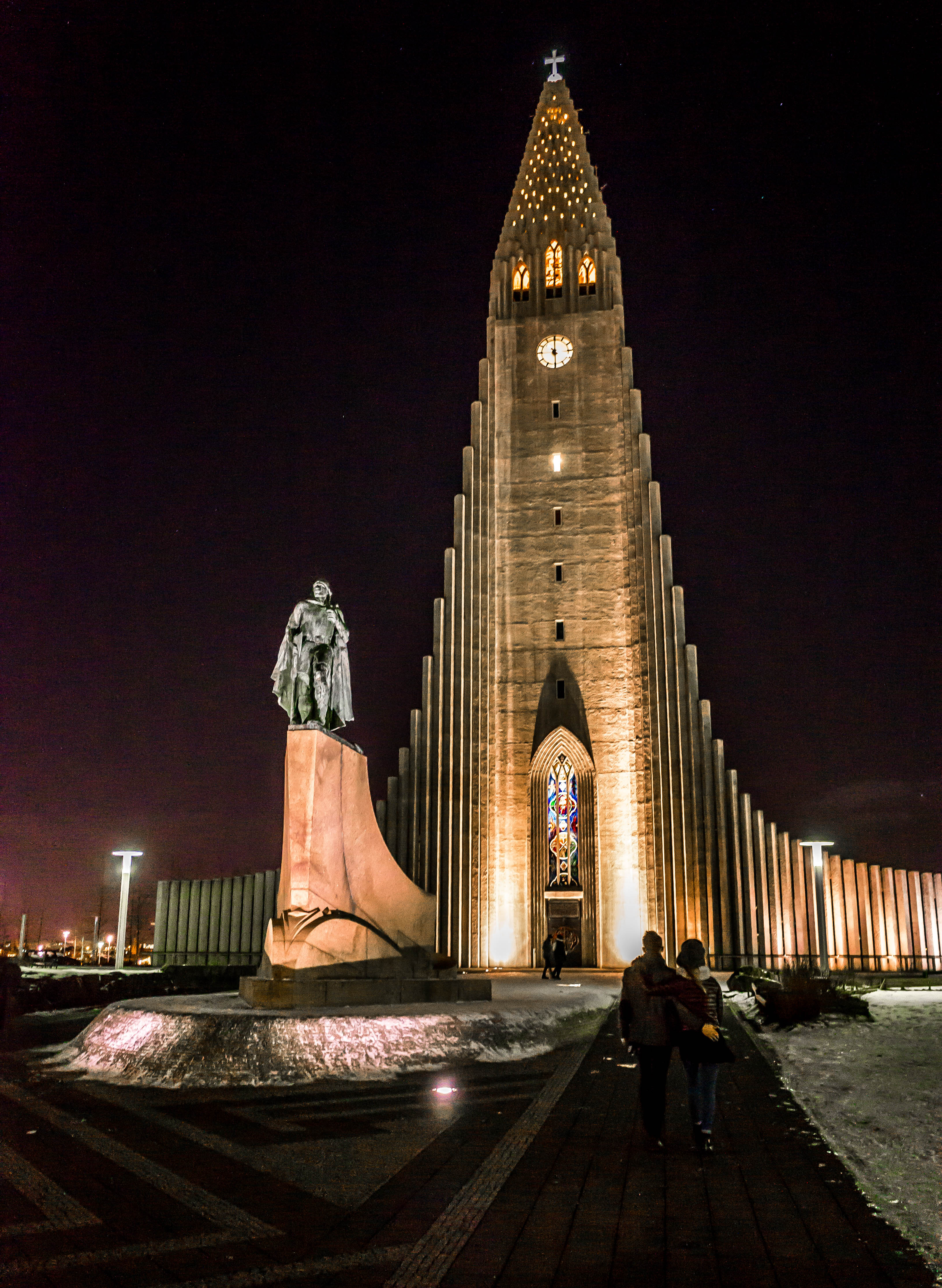 Hallgrímskirkja and Leifur Eiriksson (1932) by Alexander Stirling Calder (1870–1945)